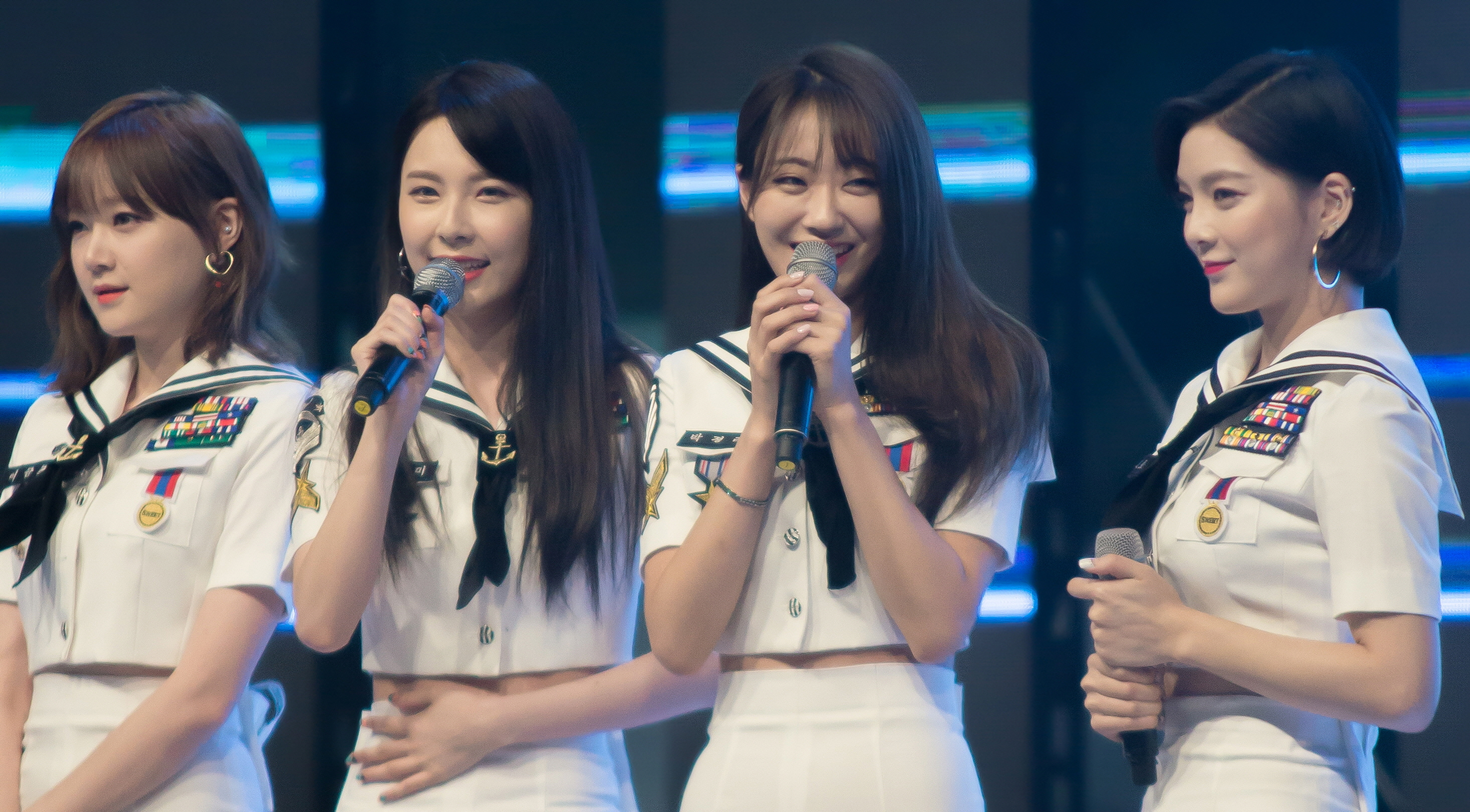 160908 순천향대학교 축제 - 나인뮤지스A